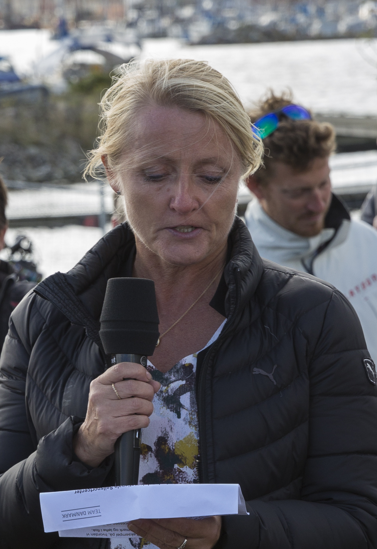 Lone Hansen